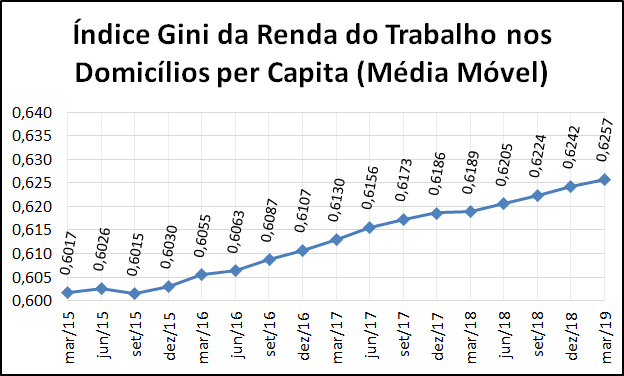 Gini da Renda do Trabalho nos Domicílios per Capita